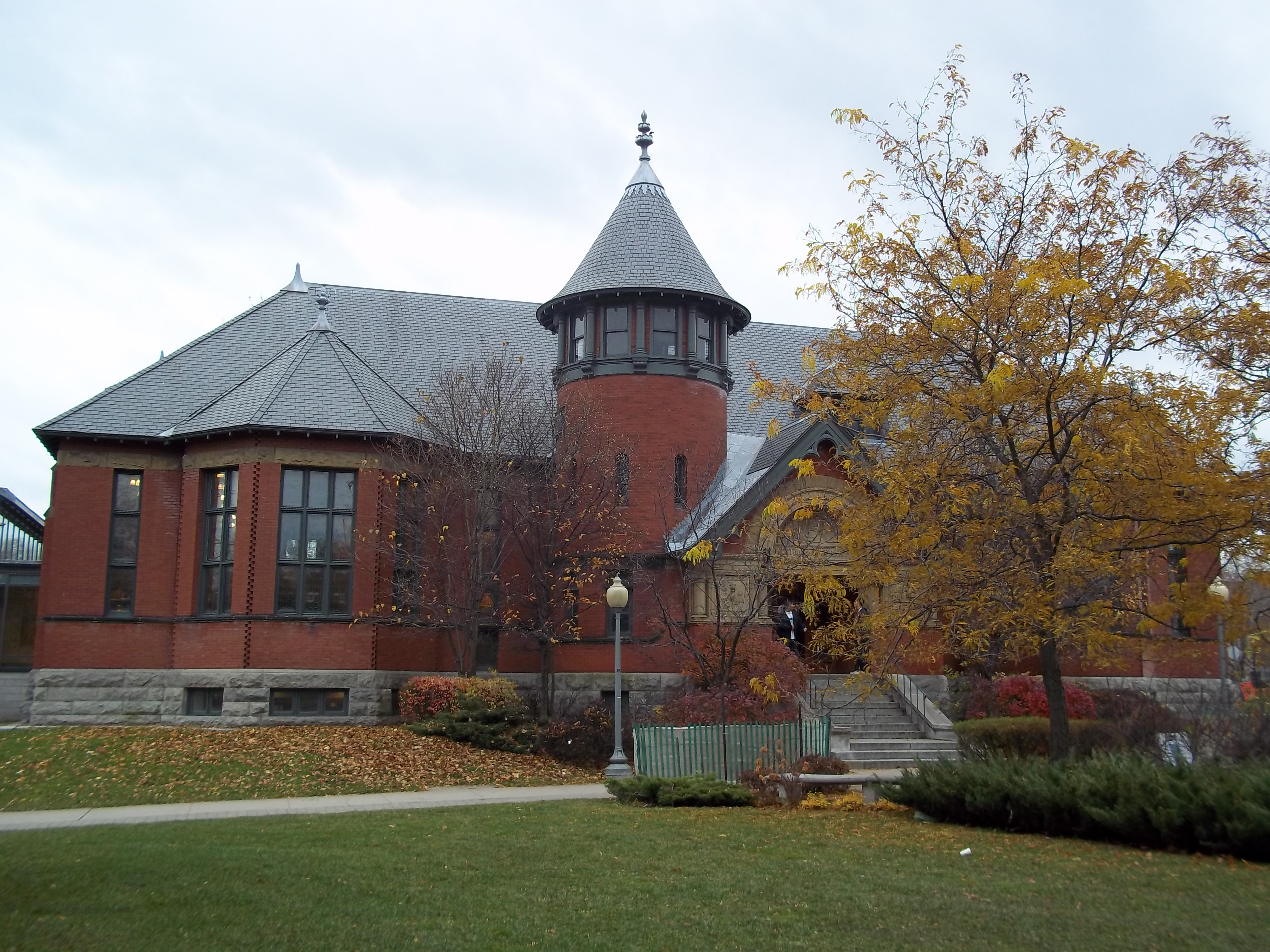 Bibliothèque publique de Westmount, 4574, rue Sherbrooke Ouest, Westmount, Montréal